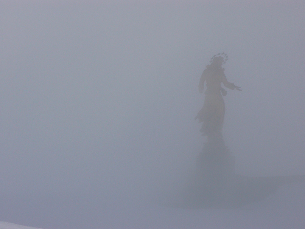 E? alta m.13.50, pesa 4 tonnellate ed � situata su una struttura circolare che forma, alla sua base, il relativo Santuario all?aperto, dove riposa il corpo di Mons. Luigi Re